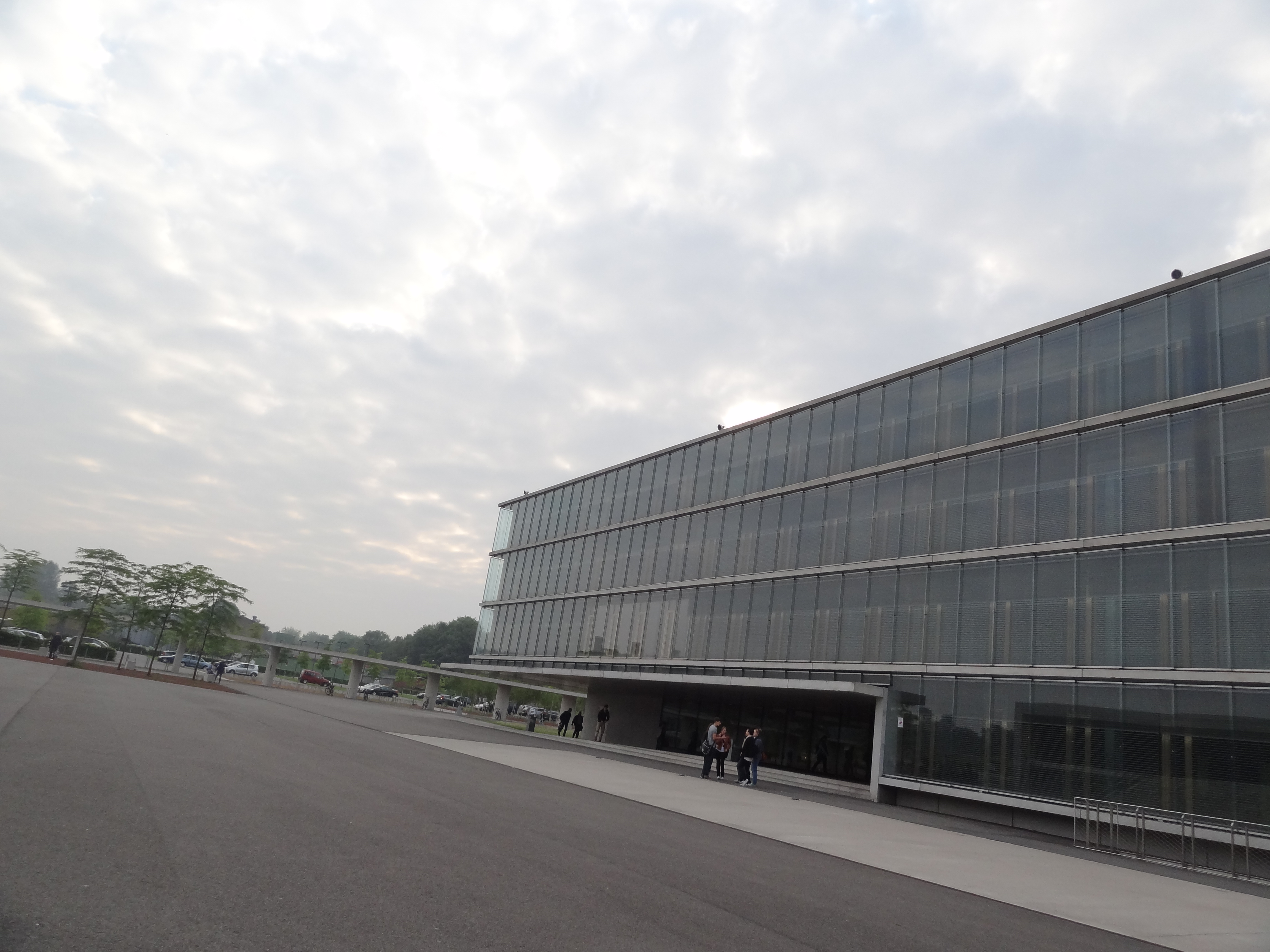 Blick auf den Haupteingang des Max-Born-Berufkollegs (MBBK) in Recklinghausen, Neubau